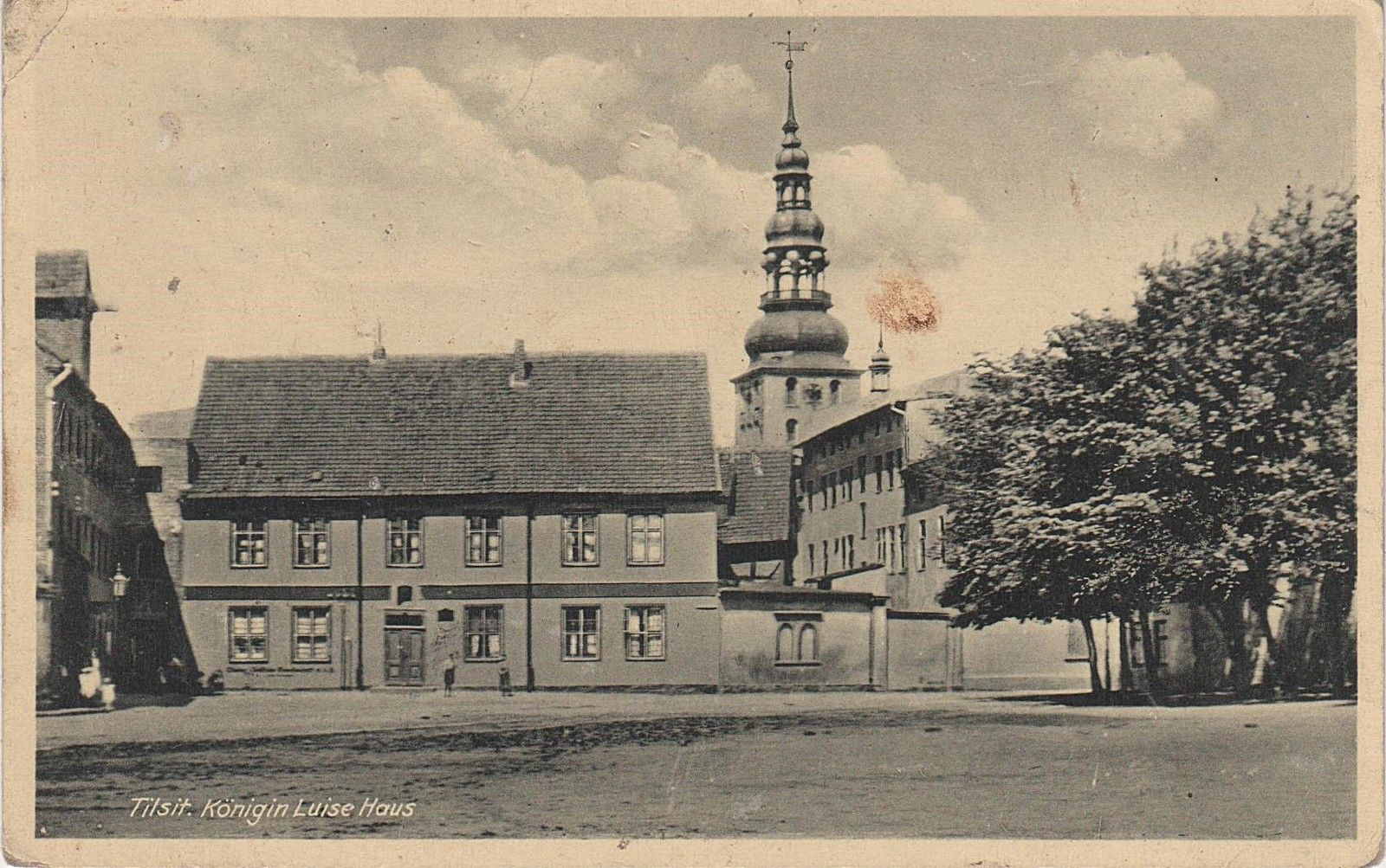 Haus des Justizkommissionsrats Ernst Ludwig Siehr in Tilsit, Deutsche Str. 24, in der die Königin am 6. Juli 1807 Napoleon traf